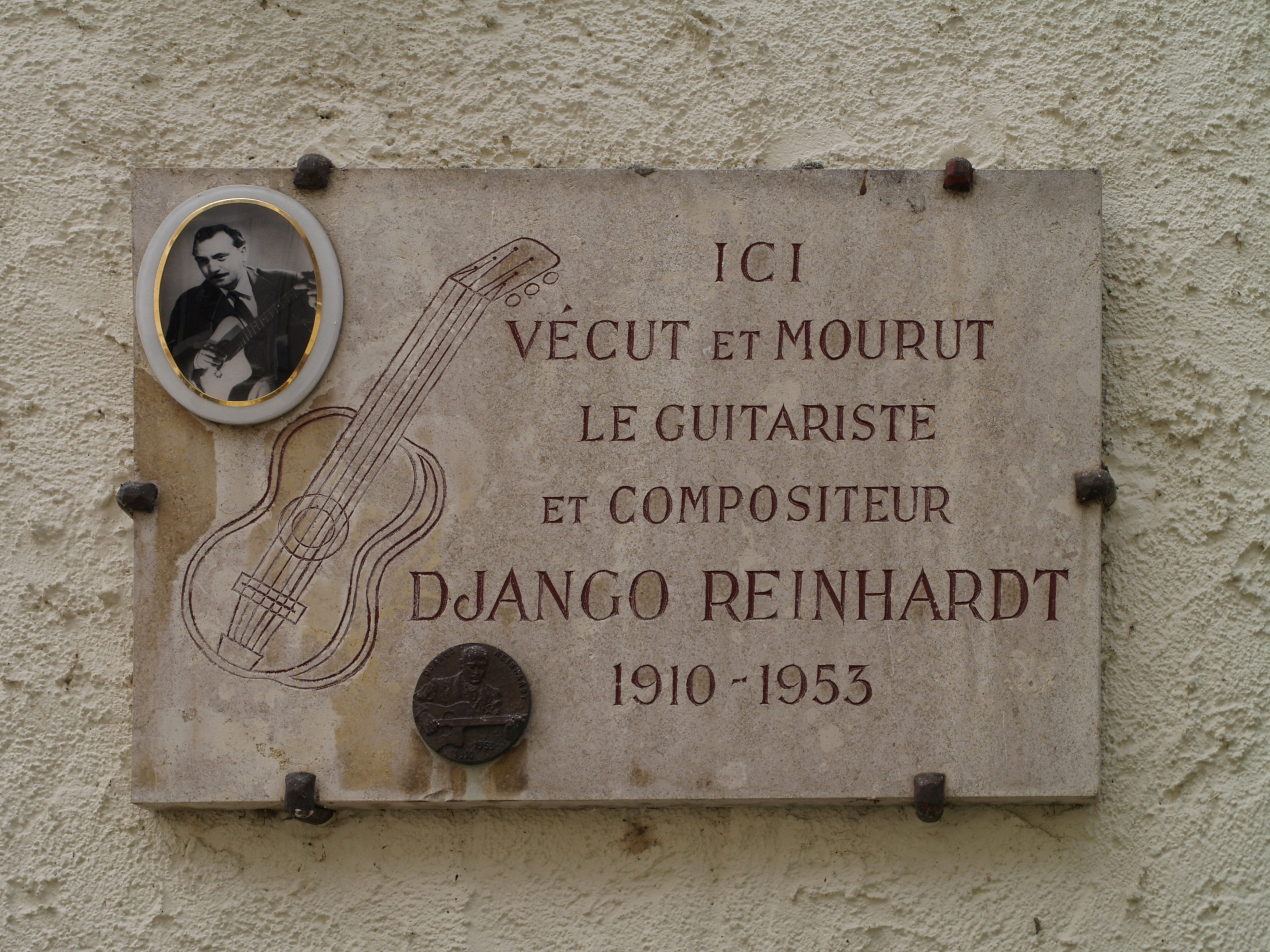 Plaque commémorative de Django Reinhardt à Samois-sur-Seine, Seine-et-Marne, France.